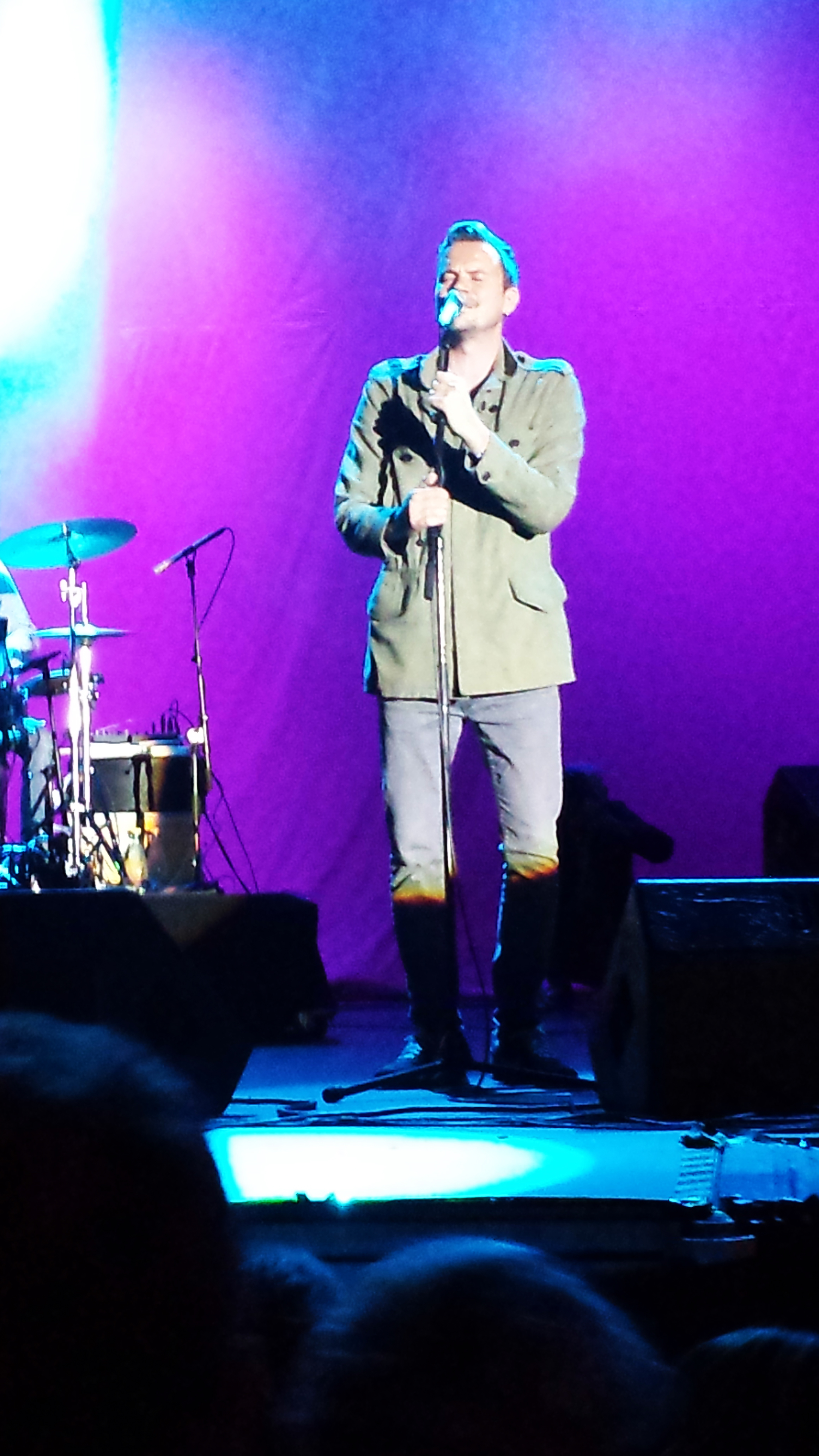 Peter Sommer optræder på Rytmehans-scenen på Smukfest.